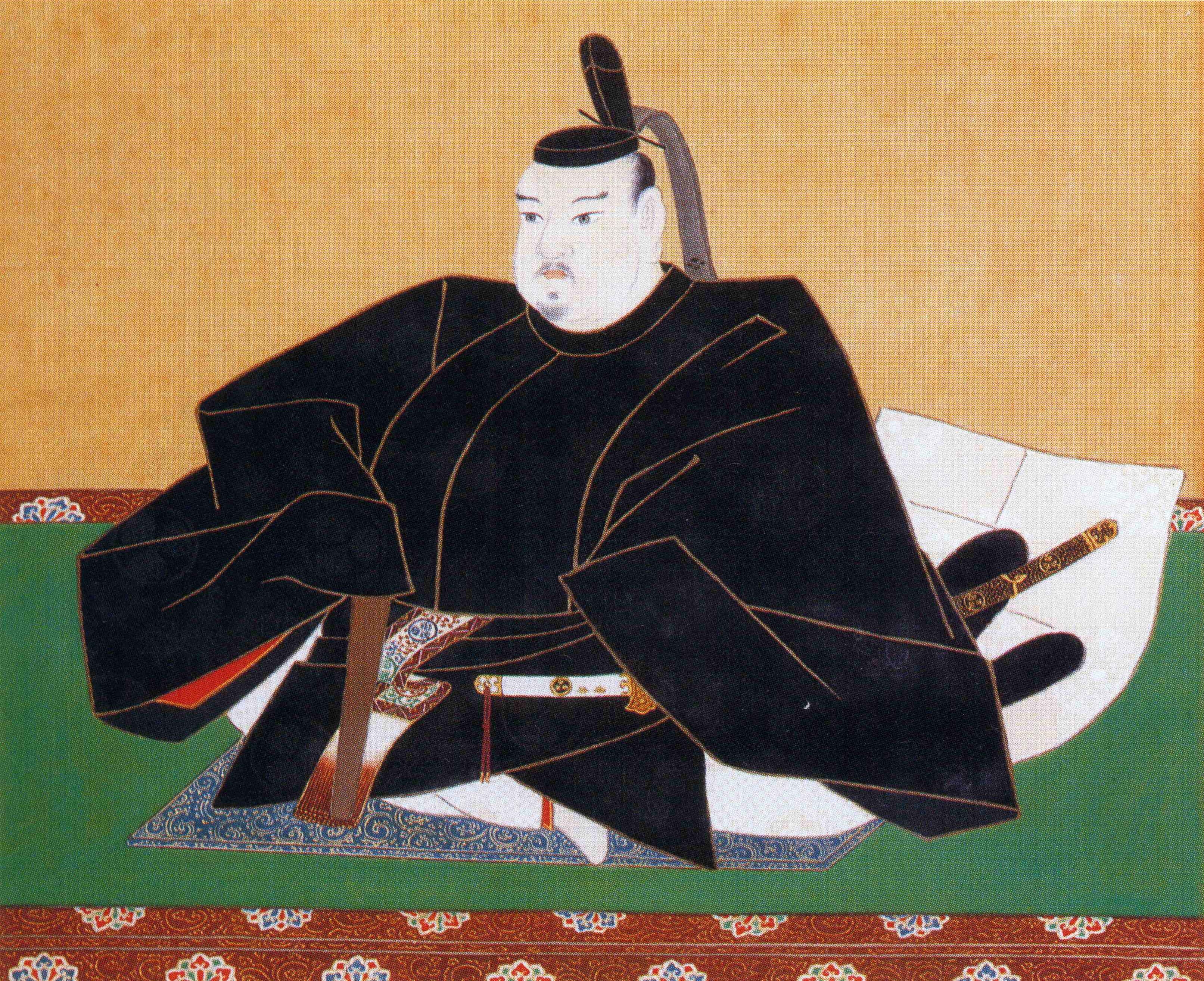 徳川家光像